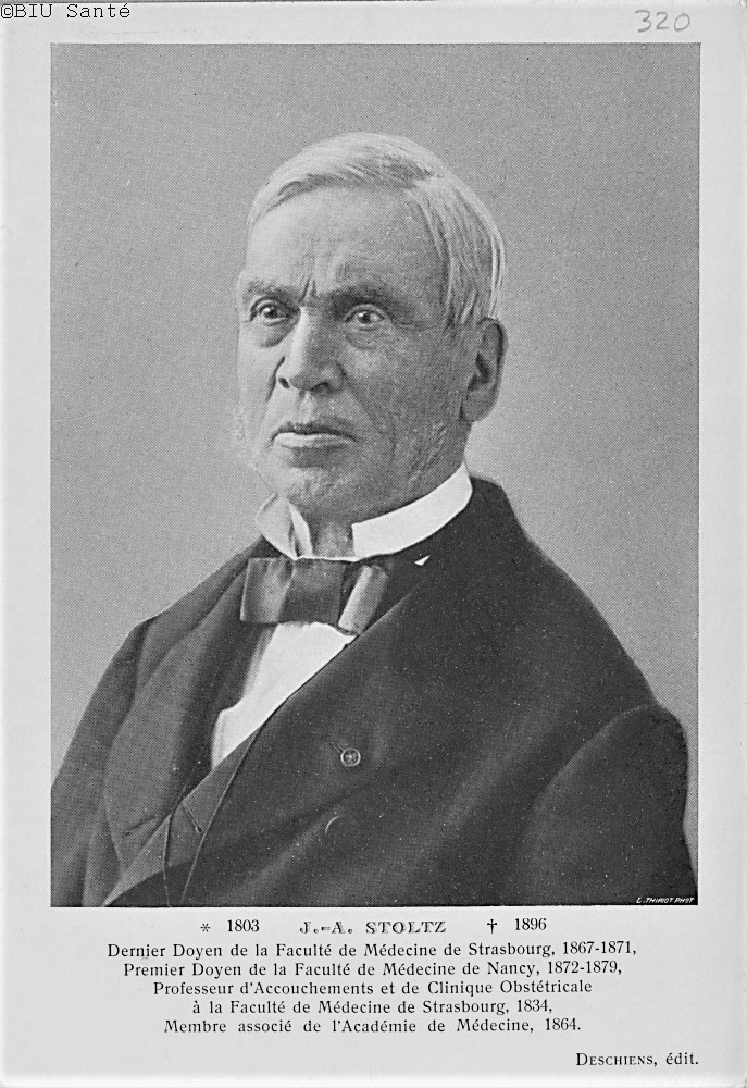 Collection de portraits J. A. Stoltz Edition : Deschiens, s.d. Photographe : Thiriot, L.